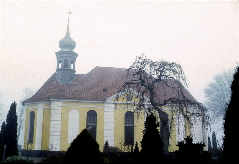 Damsholte Kirke Møn Kommune, Denmark